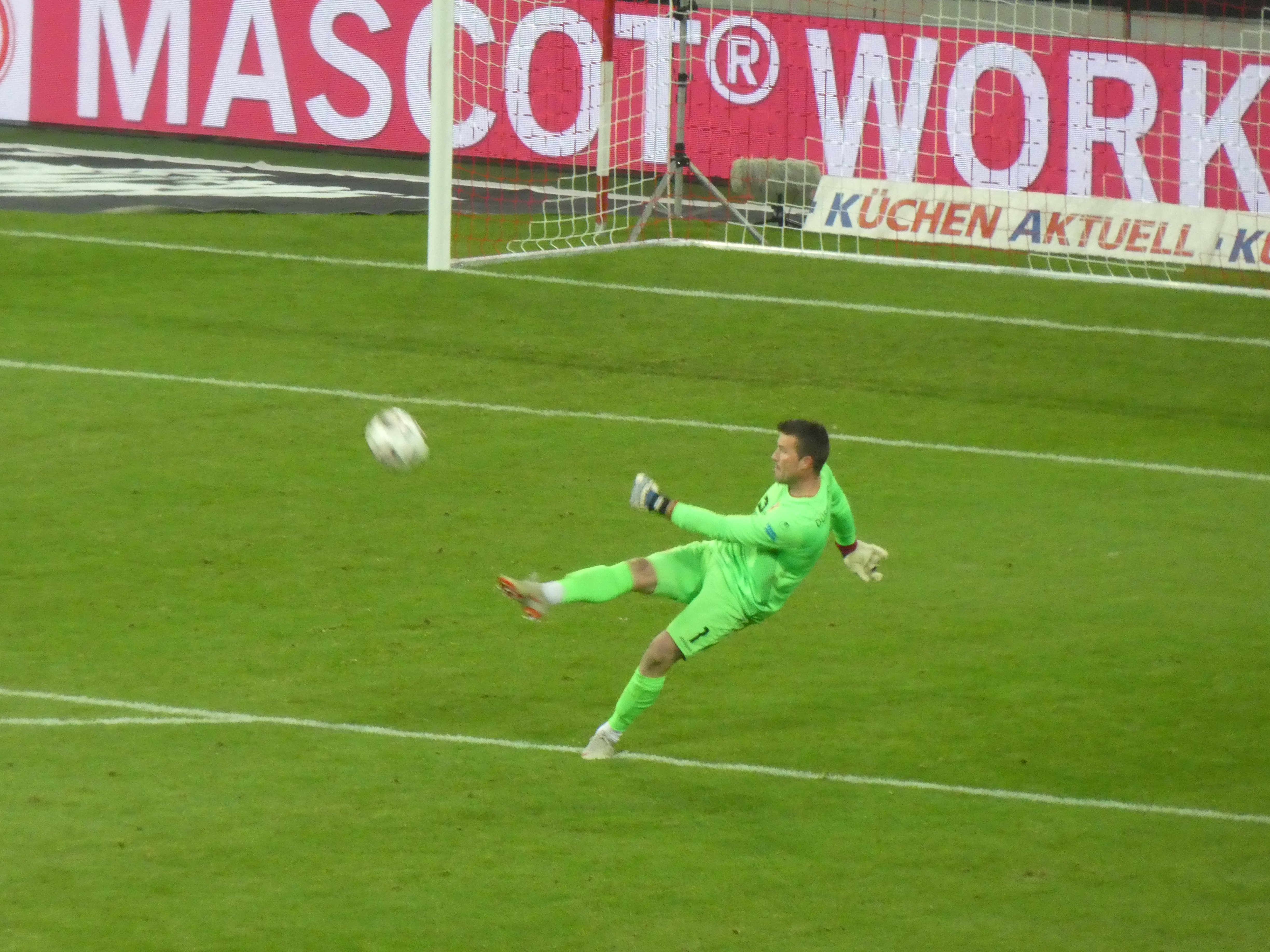 Torhüter Michael Rensing während eines Budesligaspiels, Dezember 2018